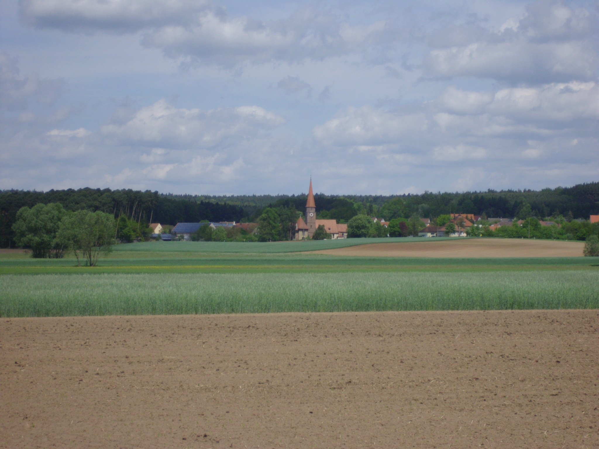 Haundorf, Gemeinde im mittelfränkischen Landkreis Weißenburg-Gunzenhausen (Bayern)